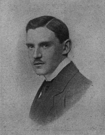 А. А. Алехин, победитель в шахматном турнире в Шевининген